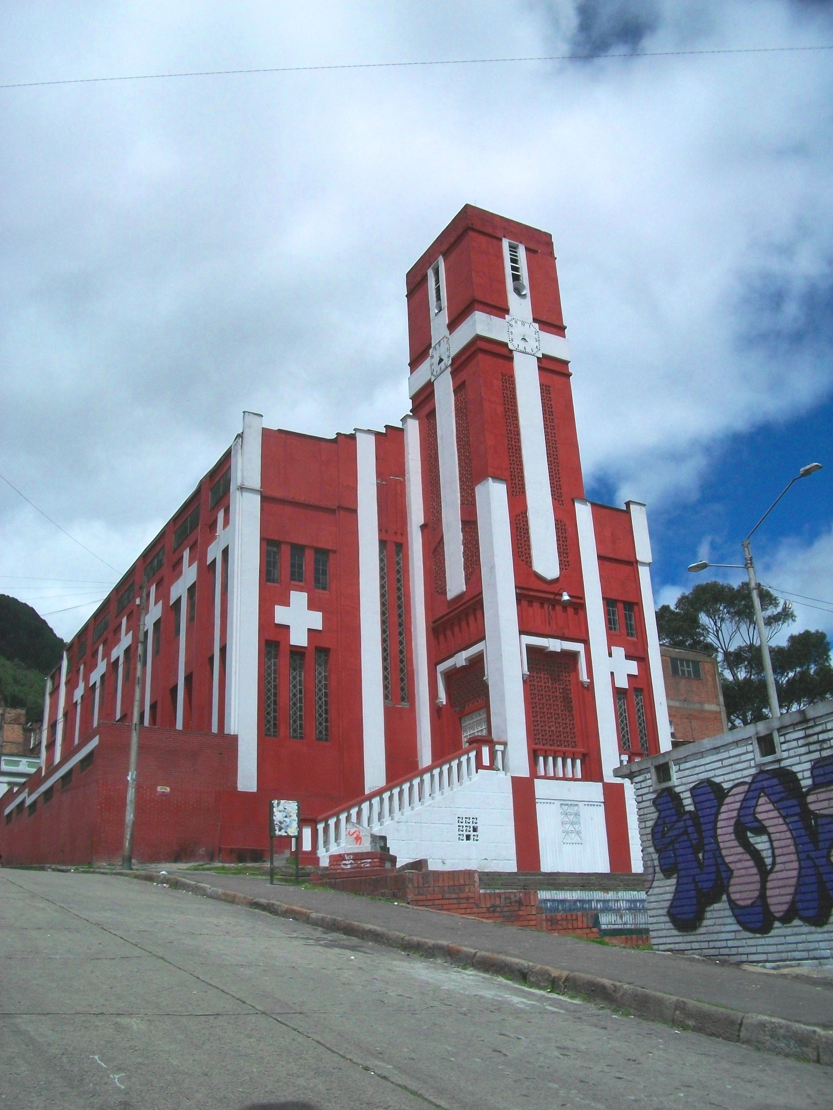 Iglesia del barrio La Perseverancia.